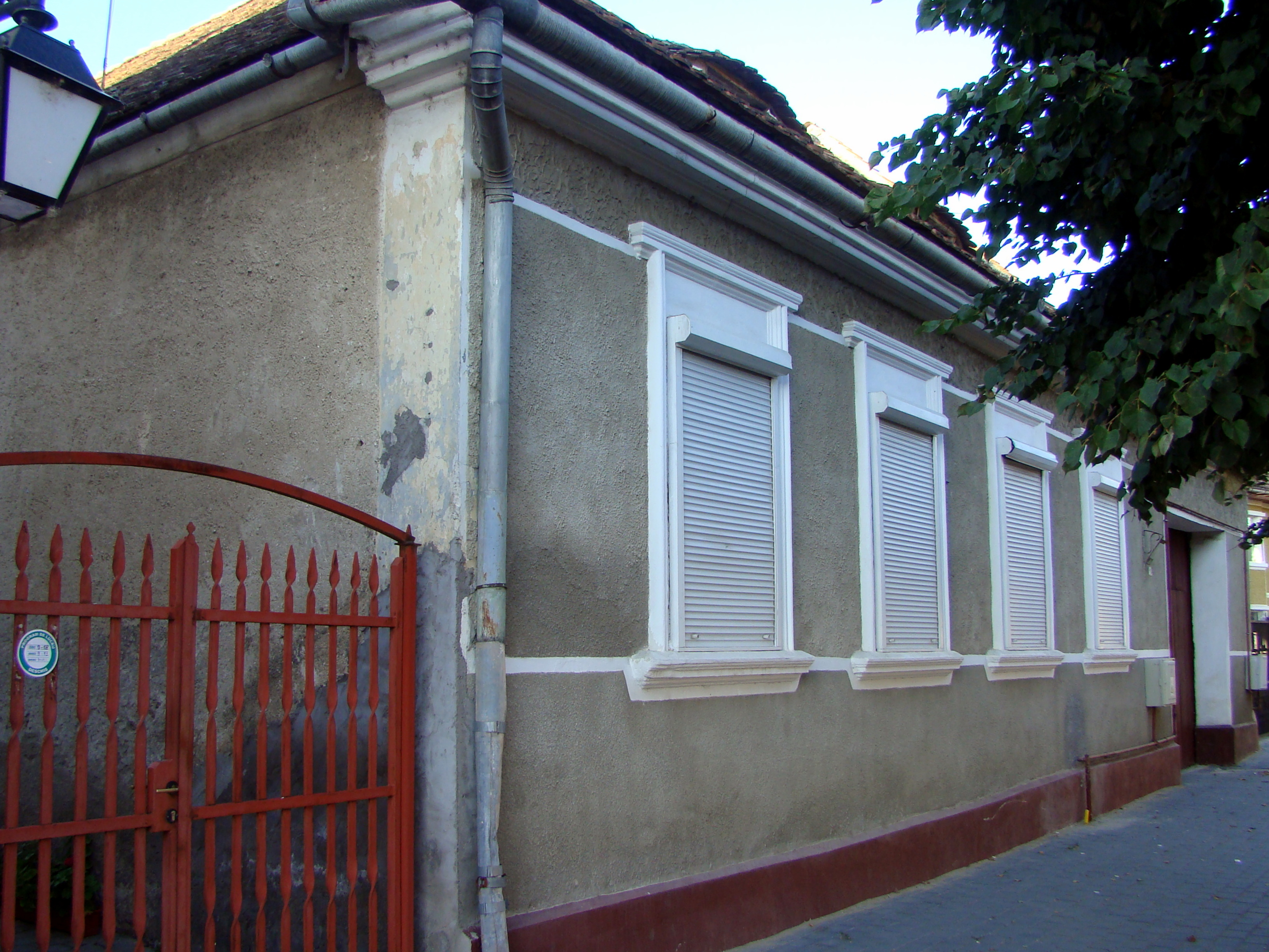 Casă, municipiul Făgăraș, str. Bălcescu Nicolae 51 sec. XVIII